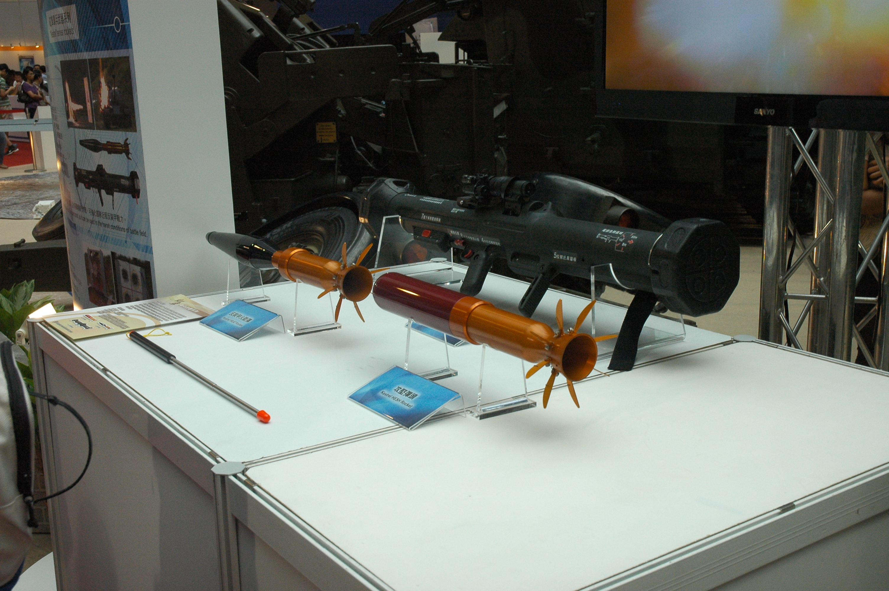 2013年航太展展出的紅隼反裝甲火箭。